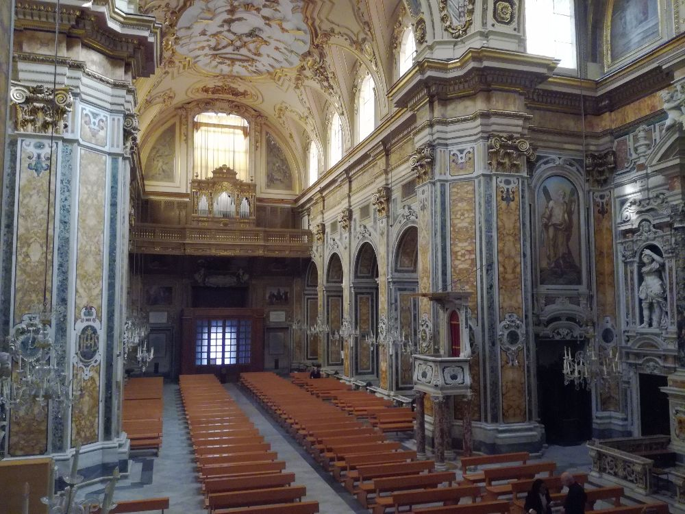 Chiesa del Gesù Vecchio dell'Immacolata di Don Placido, Napoli